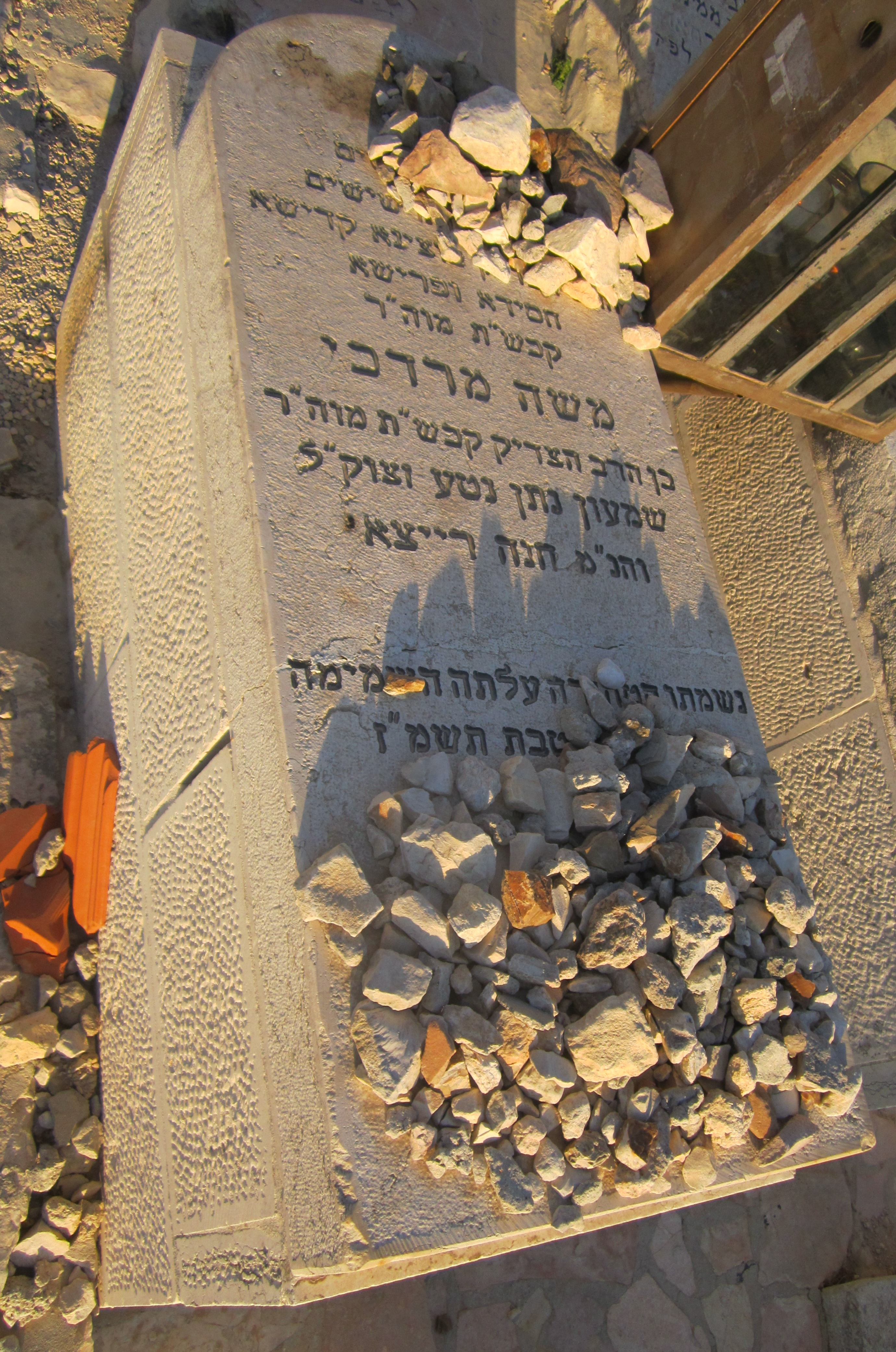 קבר רבי משה מרדכי בידרמן בן רבי שמעון נתן נתע מלעלוב בהר הזיתים